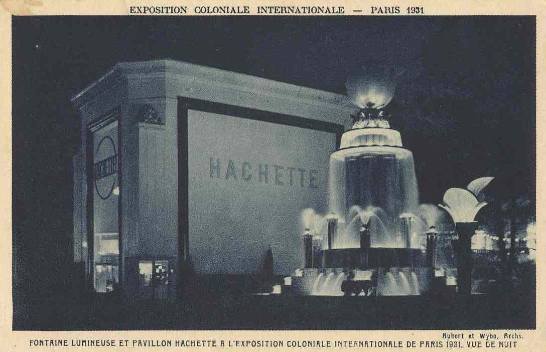 Pavillon du la société Hachette à l'Exposition Coloniale de Paris en 1931